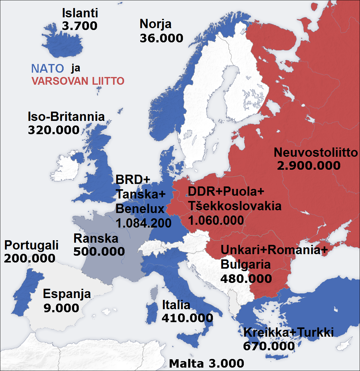 NATOn, sekä Varsovan liiton maiden joukkovahvuudet Euroopassa 1973. NATOn joukot sisältävät joukkoja Yhdysvalloista ja Kanadasta.